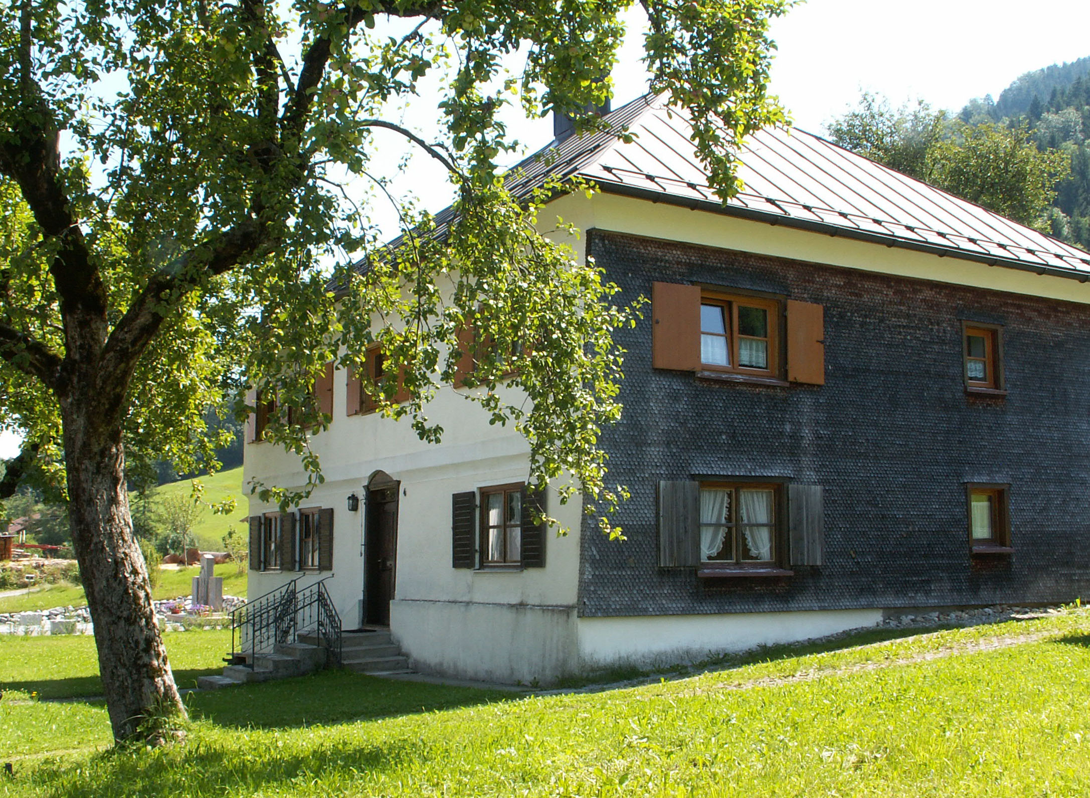 Pfarrhof in Aach im Allgäu, Oberstaufen